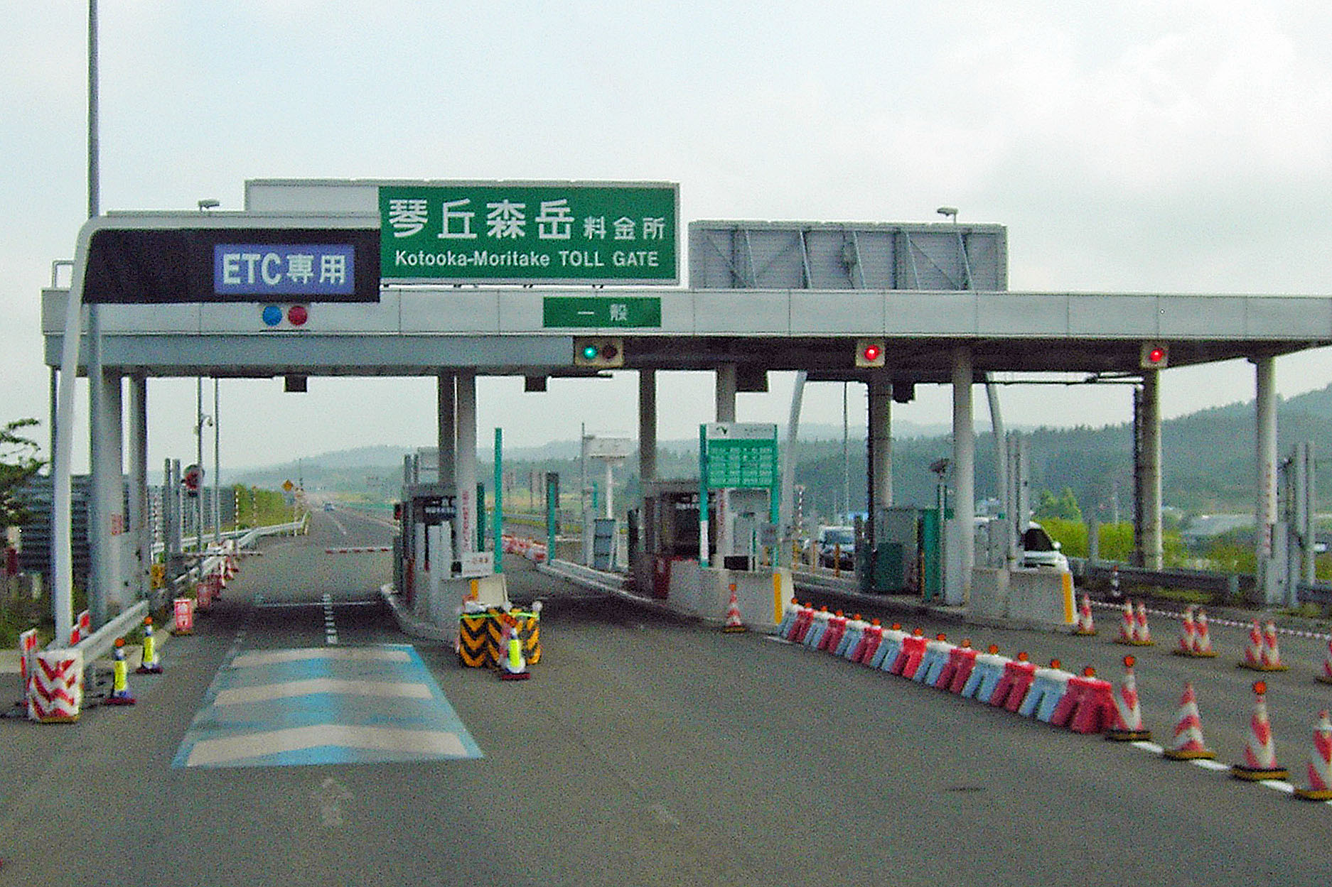 琴丘森岳本線料金所